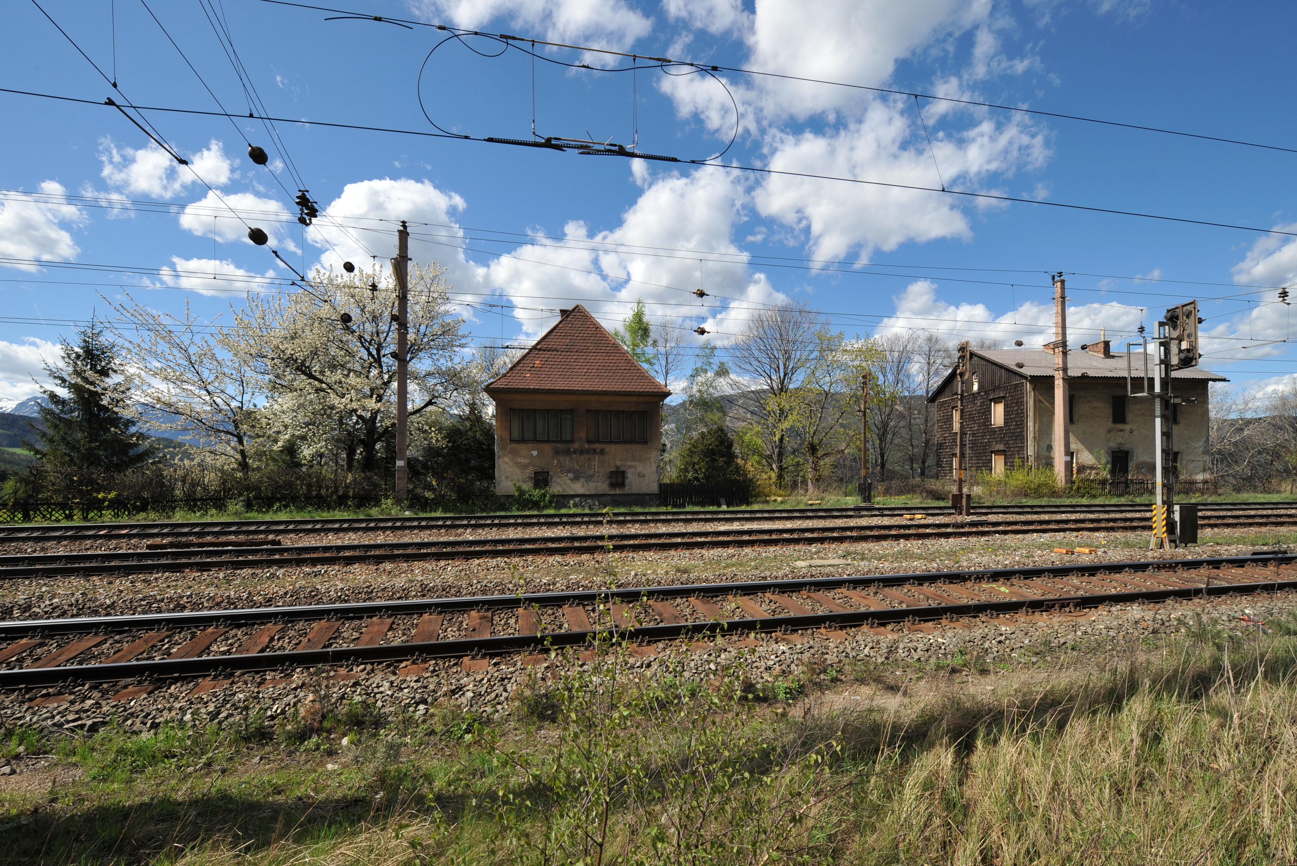 Südbahnstrecke Semmering-Bahn (Gloggnitz–Mürzzuschlag) KG Eichberg